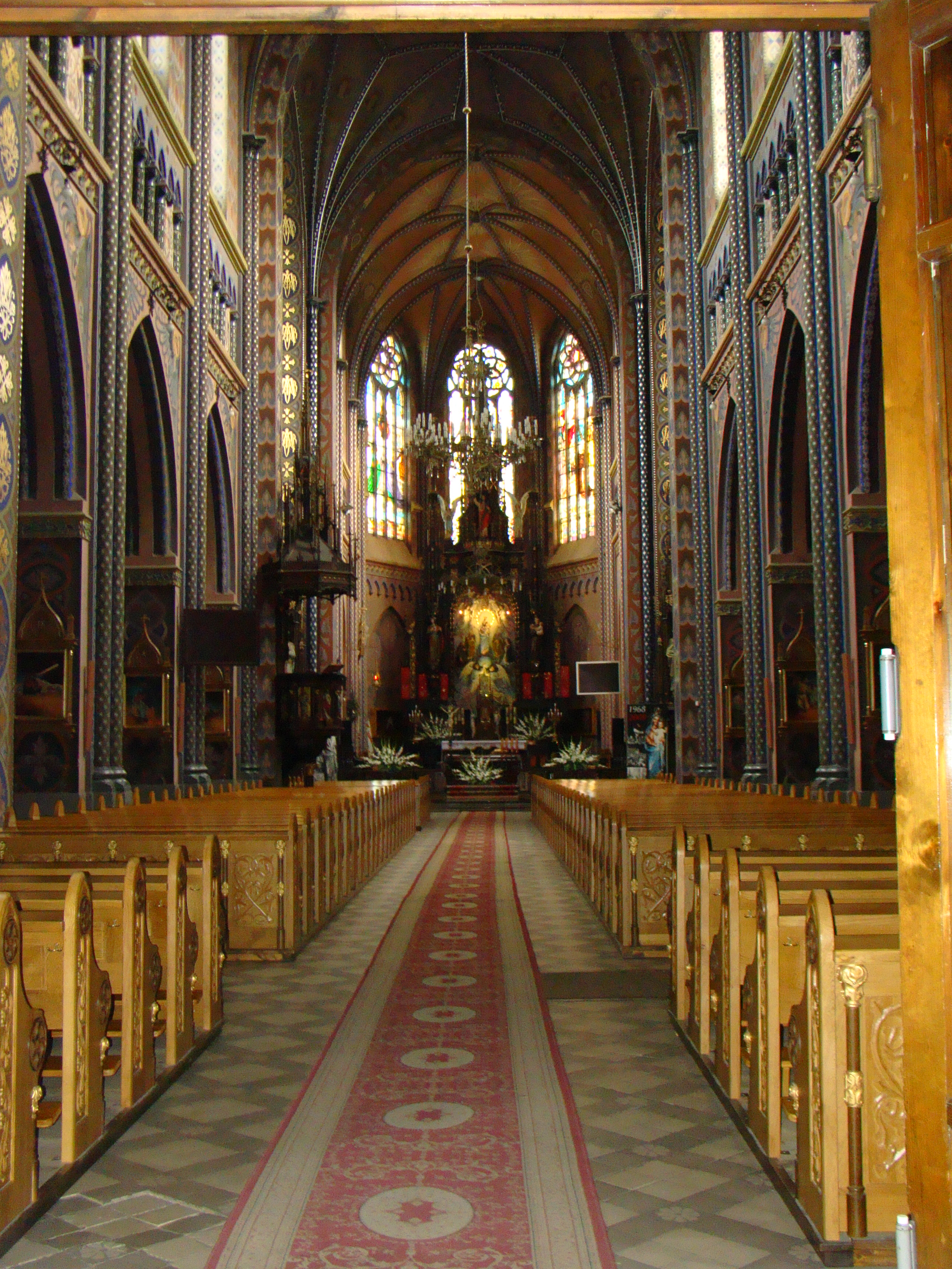 Dąbrowa Górnicza, Bazylika Najświętszej Maryi Panny Anielskiej, 1875, 1898-1912